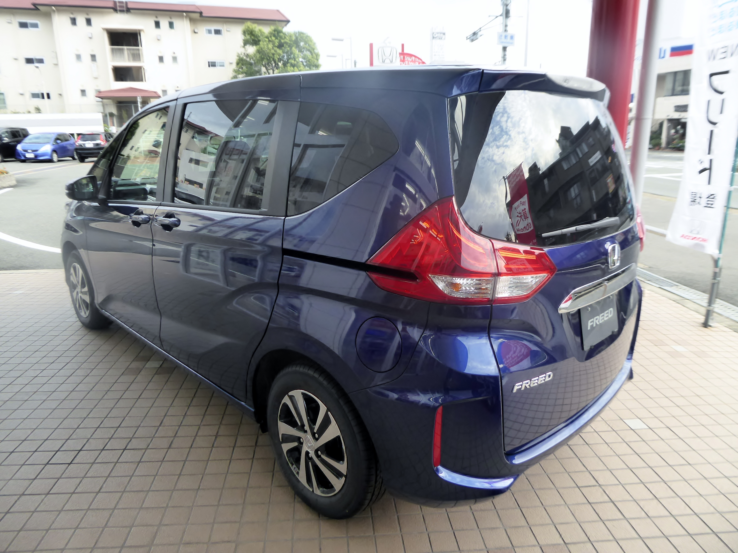 DAA-GB7型ホンダ・フリードハイブリッドEXをリアから撮影。